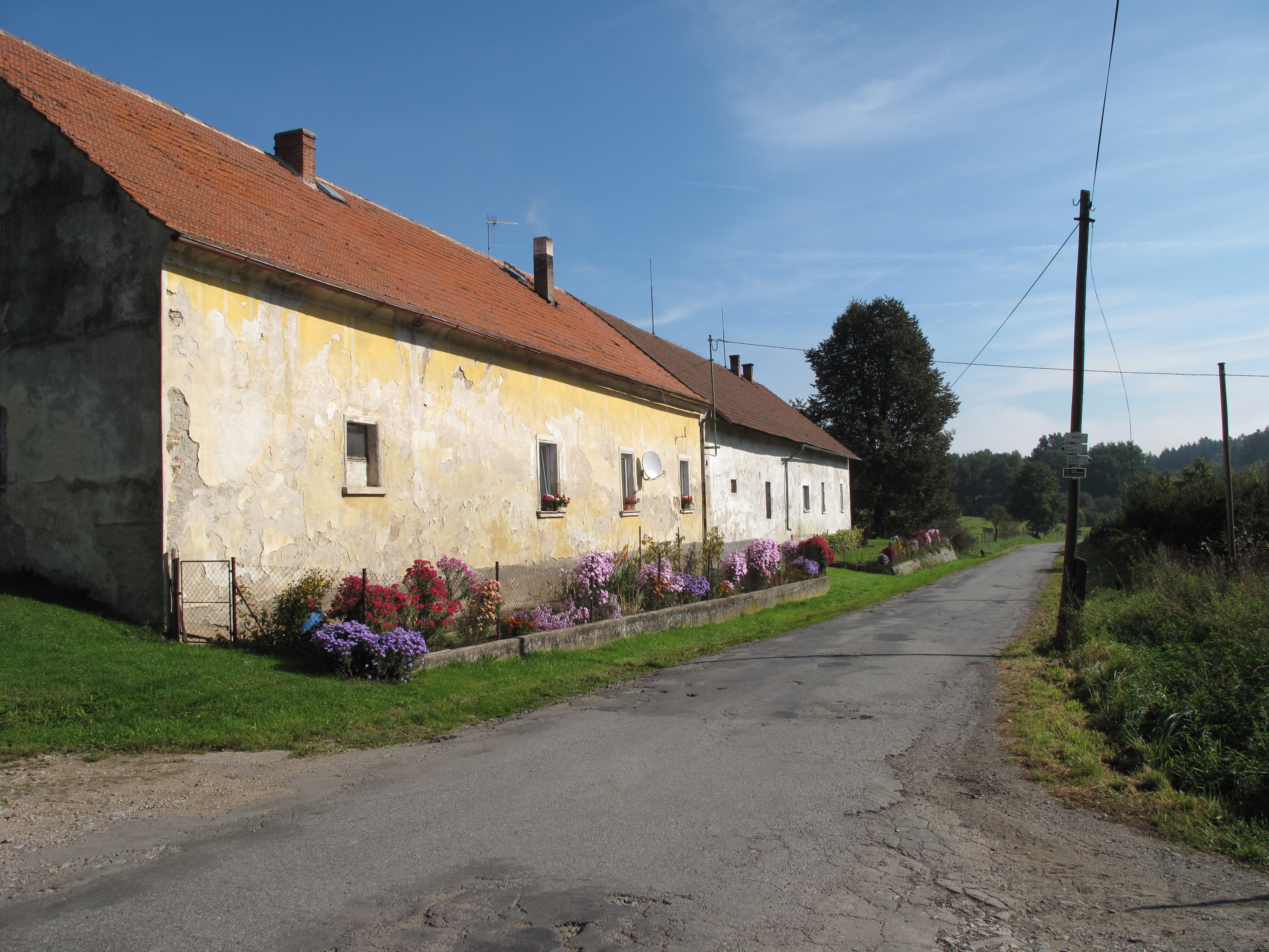 Silnice v Benicích. Okres Benešov, Česká republika.